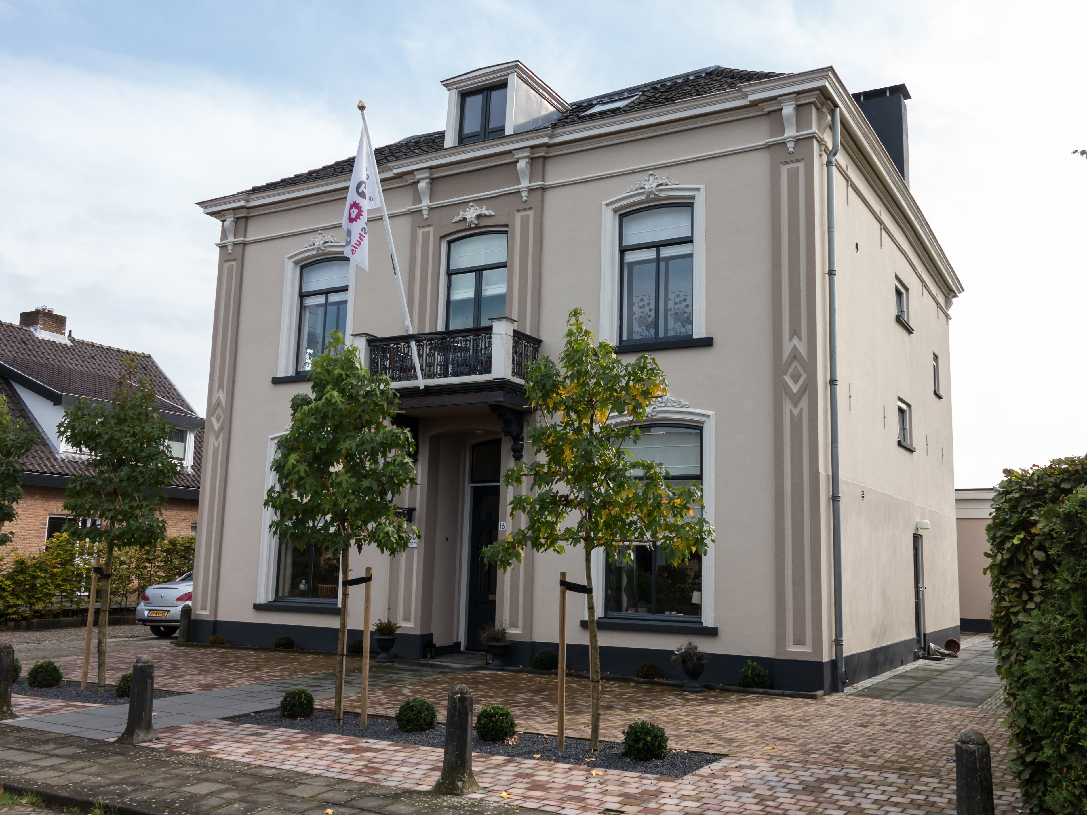 Woonhuis, ca. 1890. Op dit moment in gebruik als Thomashuis